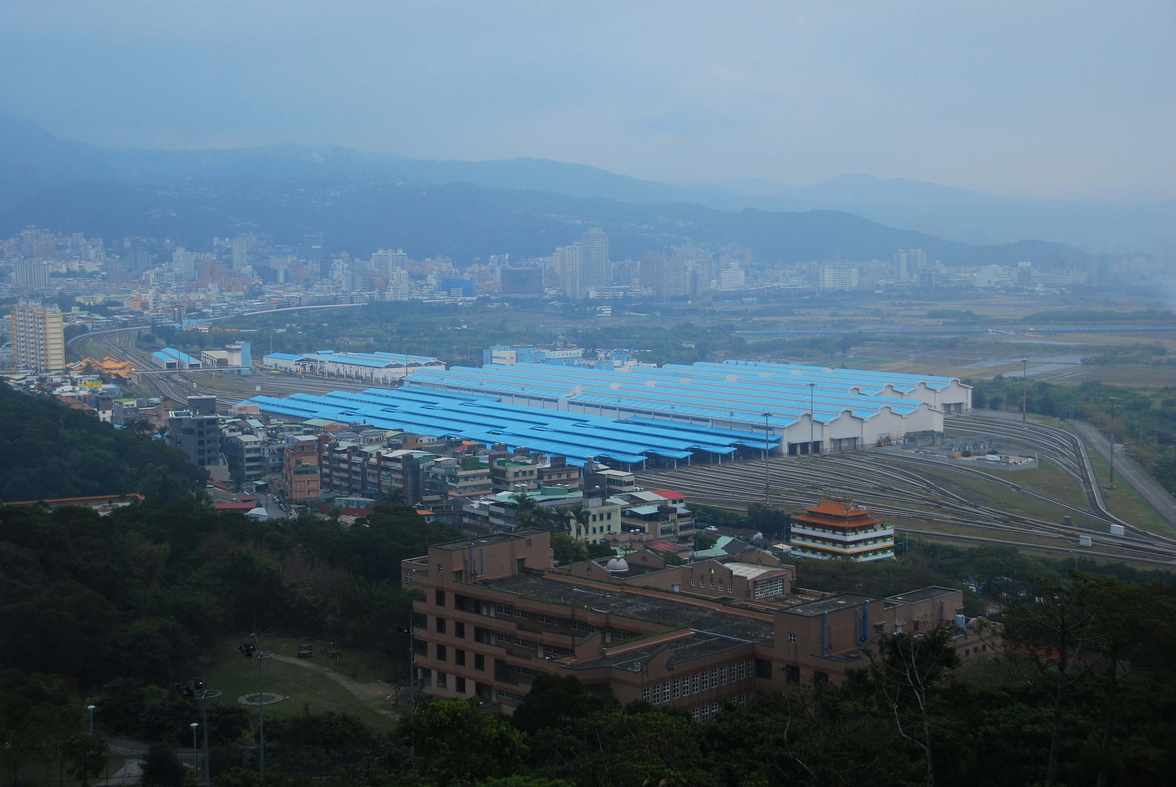 中文（台灣）: 台北捷運北投機廠